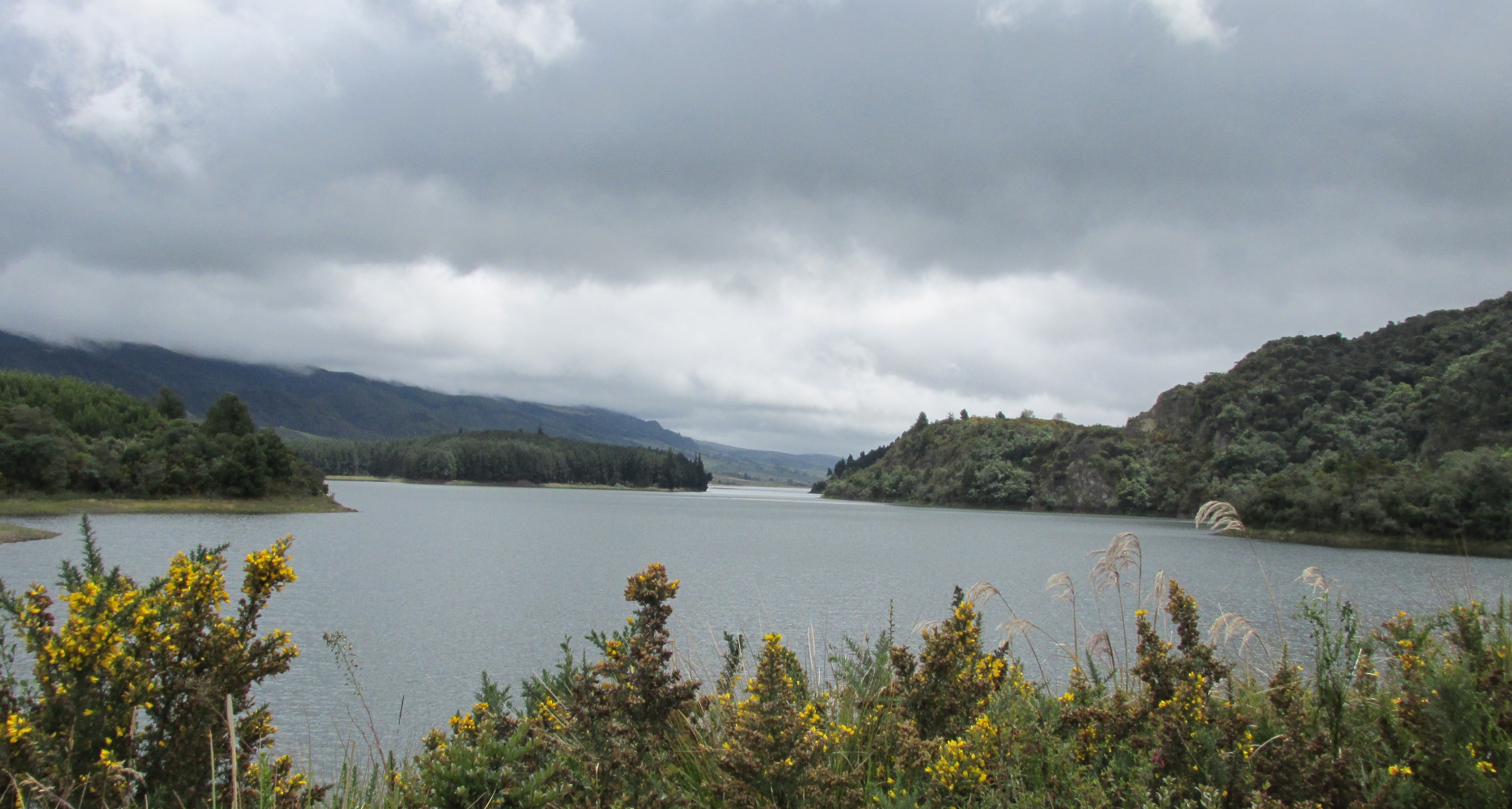 Esta fotografía fue tomada en el municipio colombiano con código 25200.